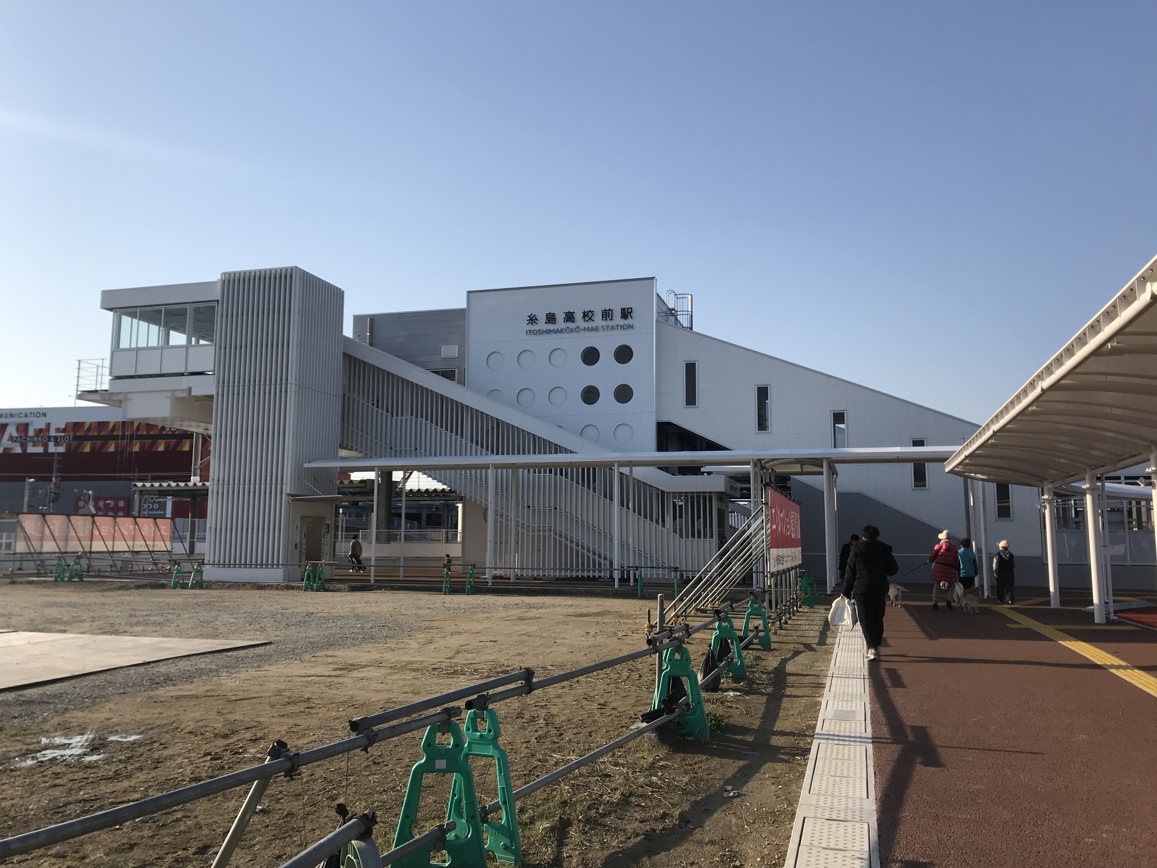 糸島高校前駅の南口駅舎